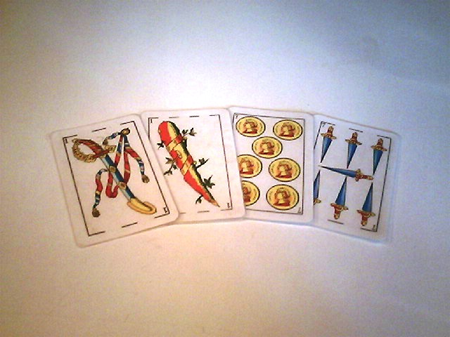 Las cuatro cartas más valiosas en el juego de truco: los ases (anchos) de espadas y bastos, el siete de espadas y el siete de oro.